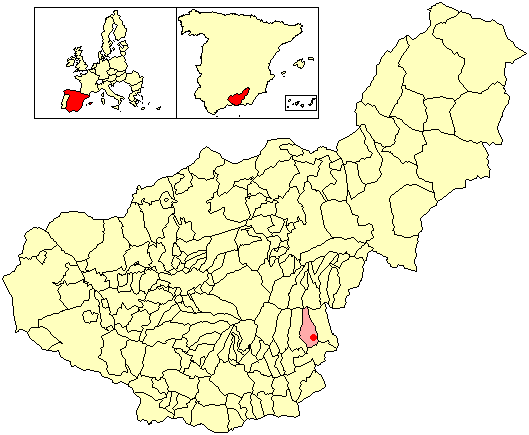 Situación de la localidad de Nechite (en el municipio de Válor) respecto a la provincia de Granada, en España.